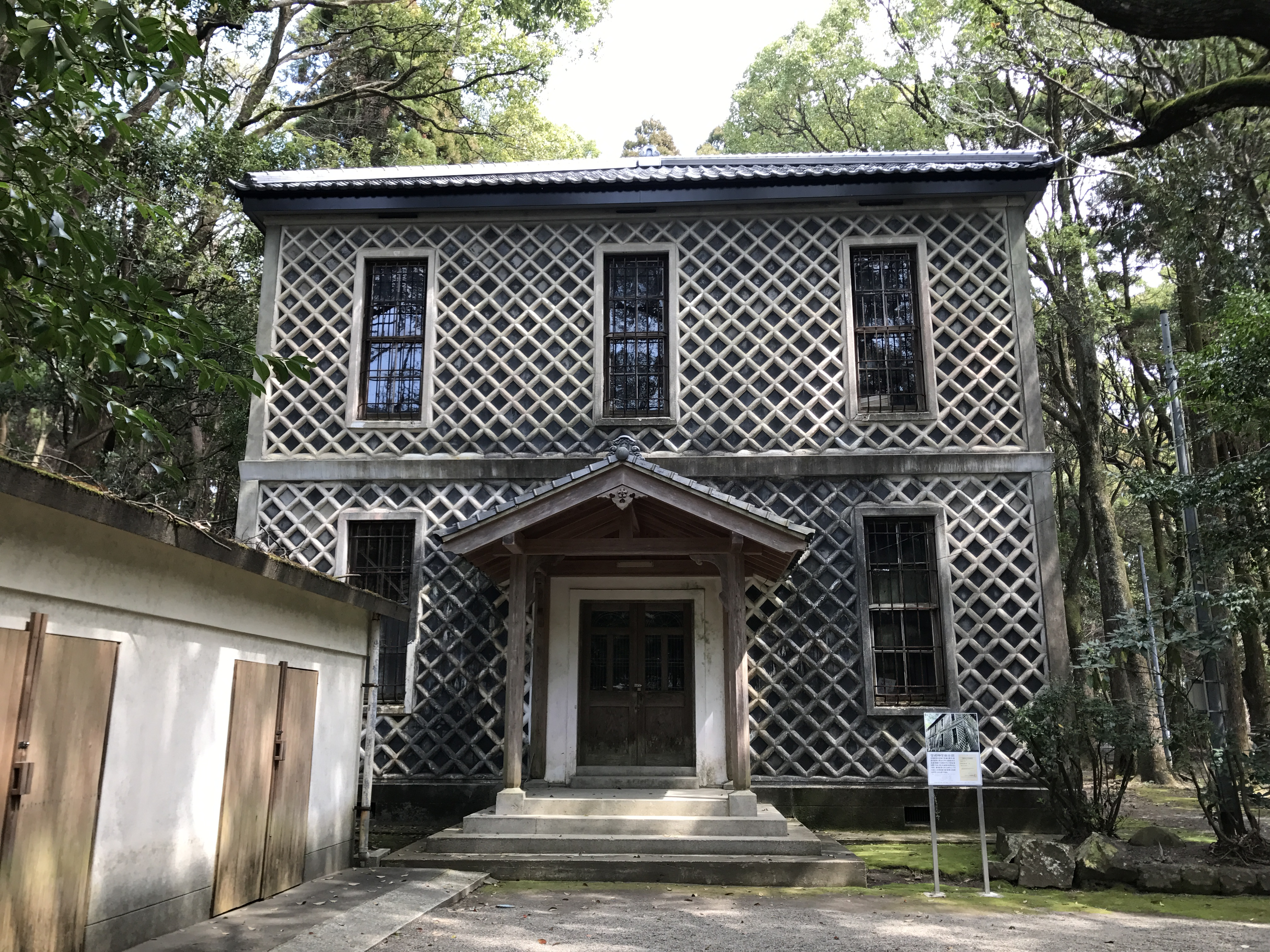 宮崎神宮・旧徴古館